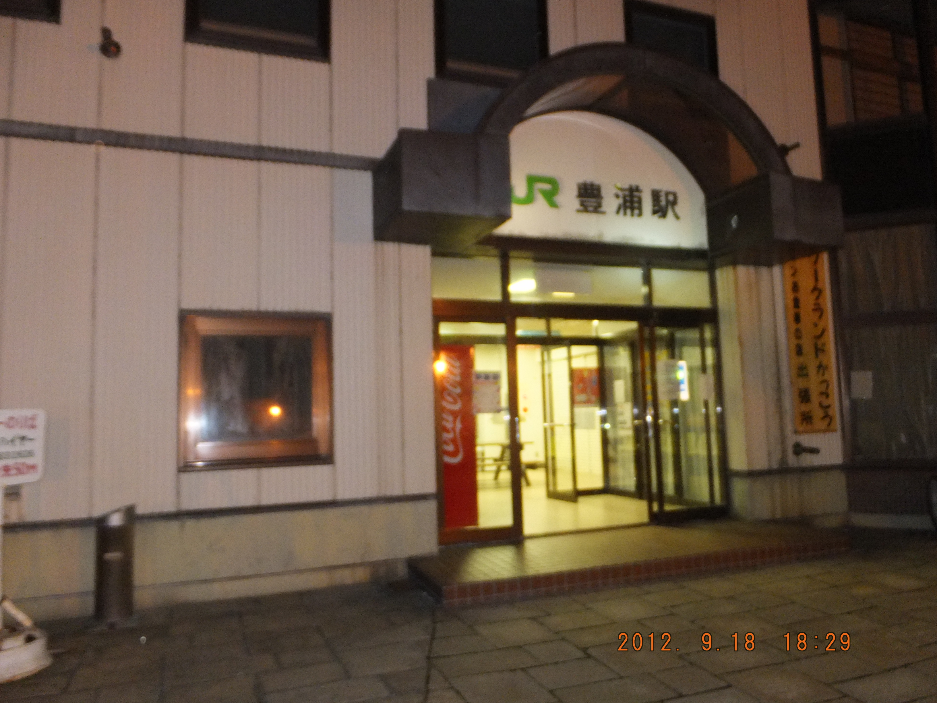 豊浦駅